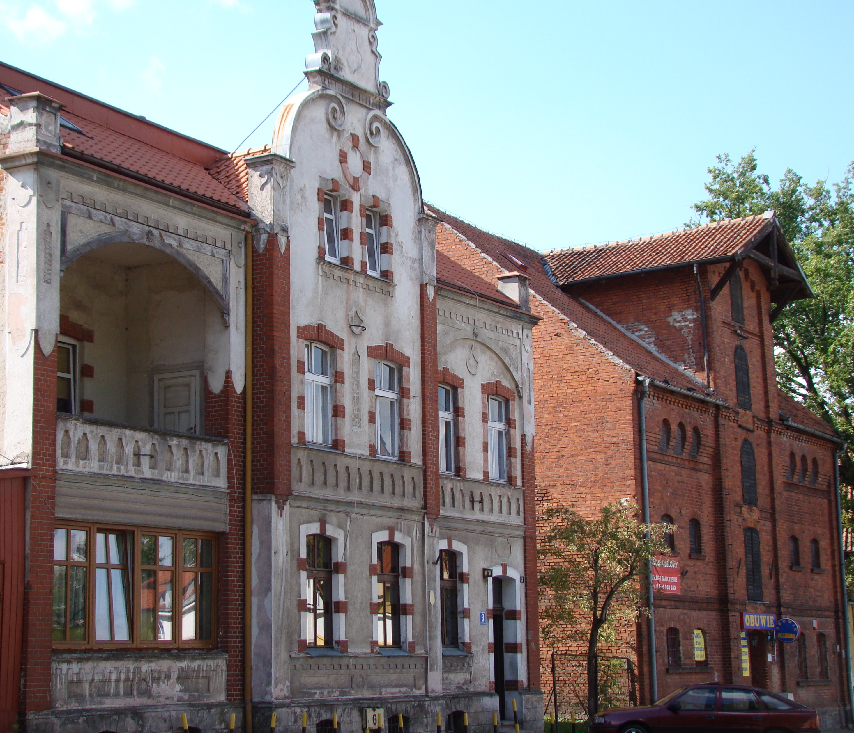 Dobre Miasto - dom przy ul. Warszawskiej